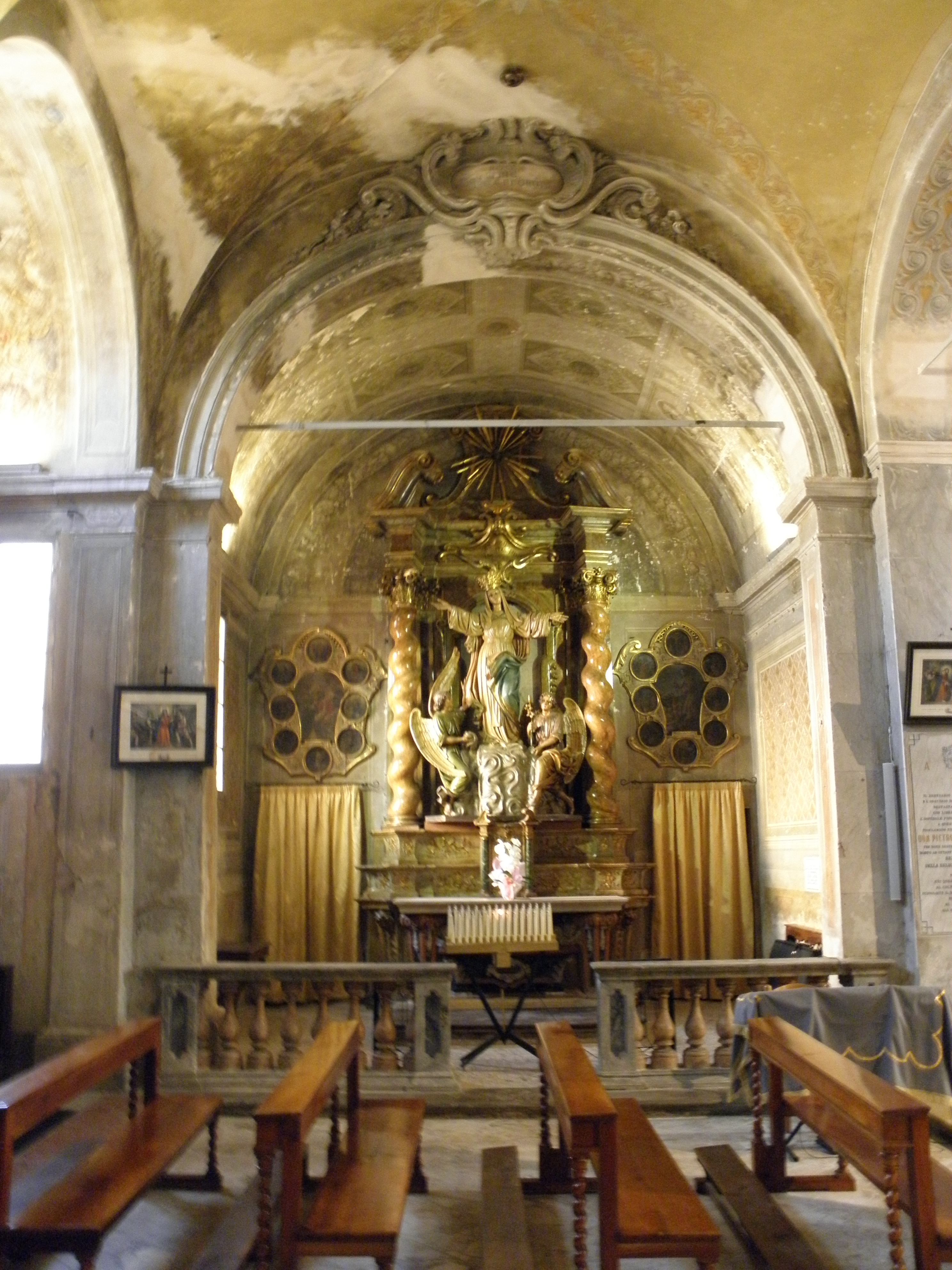 Sissa, già comune autonomo, frazione di Sissa Trecasali: chiesa parrocchiale di Santa Maria Assunta, interno, altare laterale.